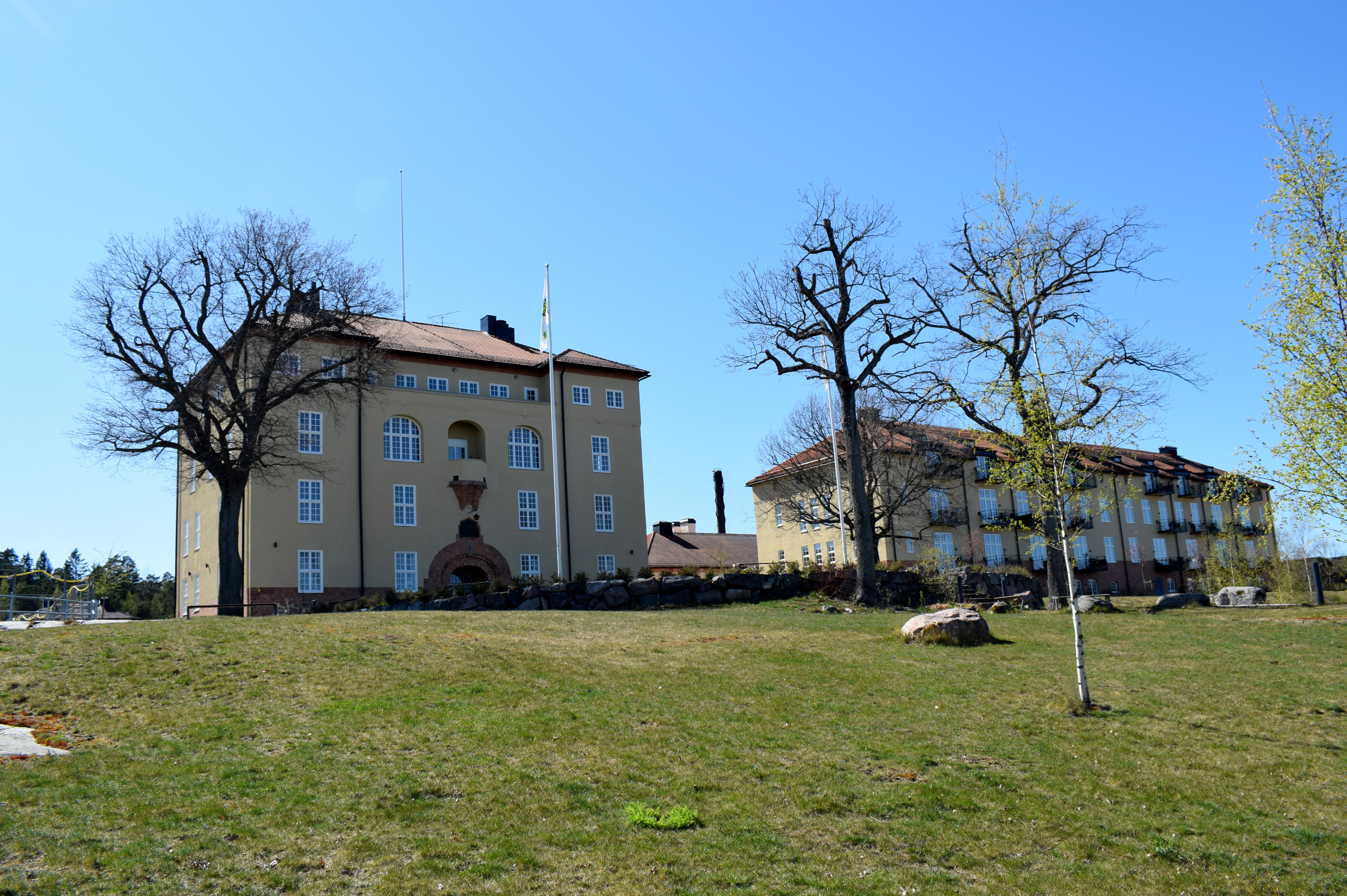 Kanslihuset vid kasernetablissementet vid före detta Strängnäs garnison